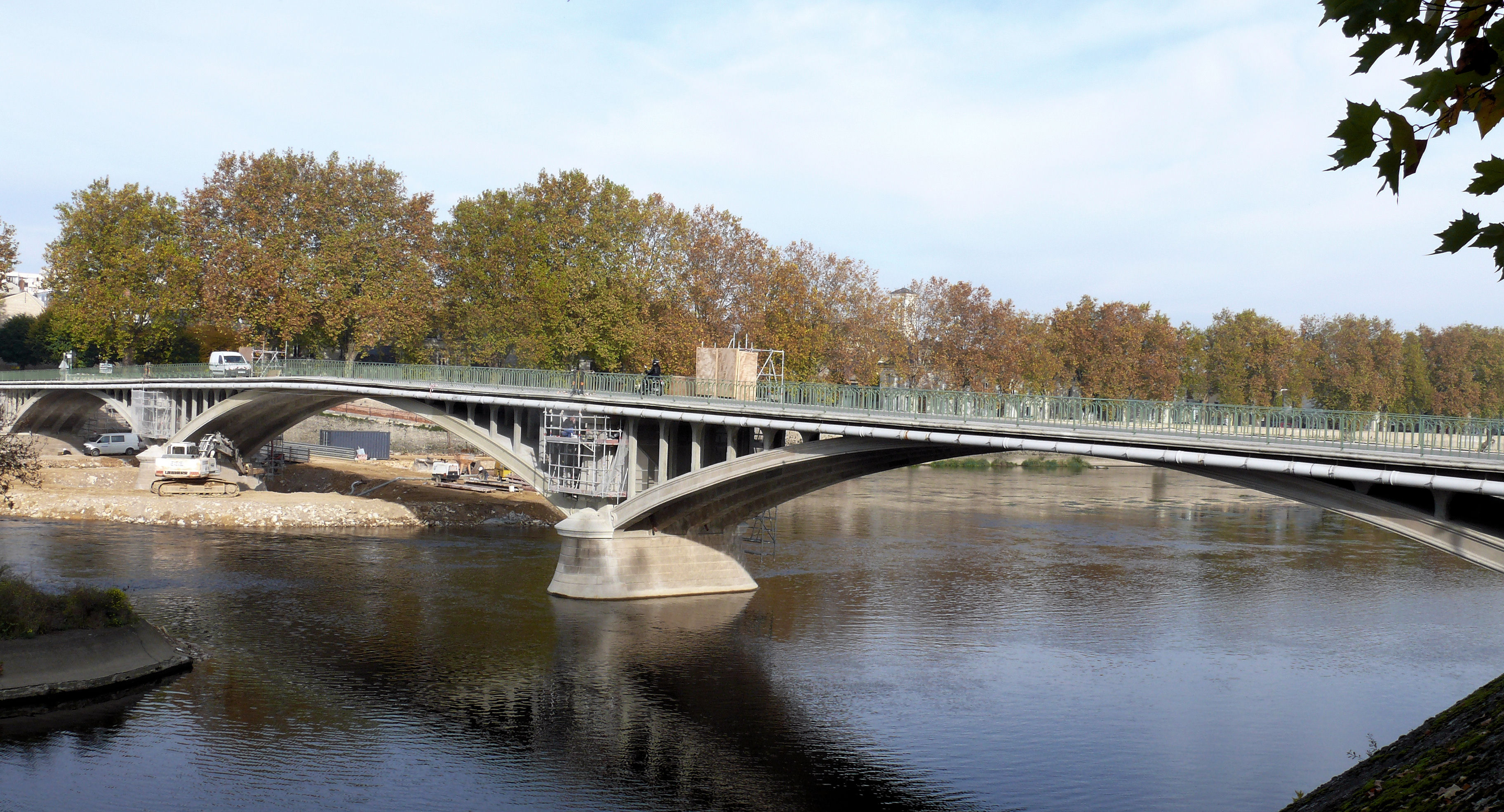 Châtellerault - Pont Camille-de-Hogues vu de l'amont